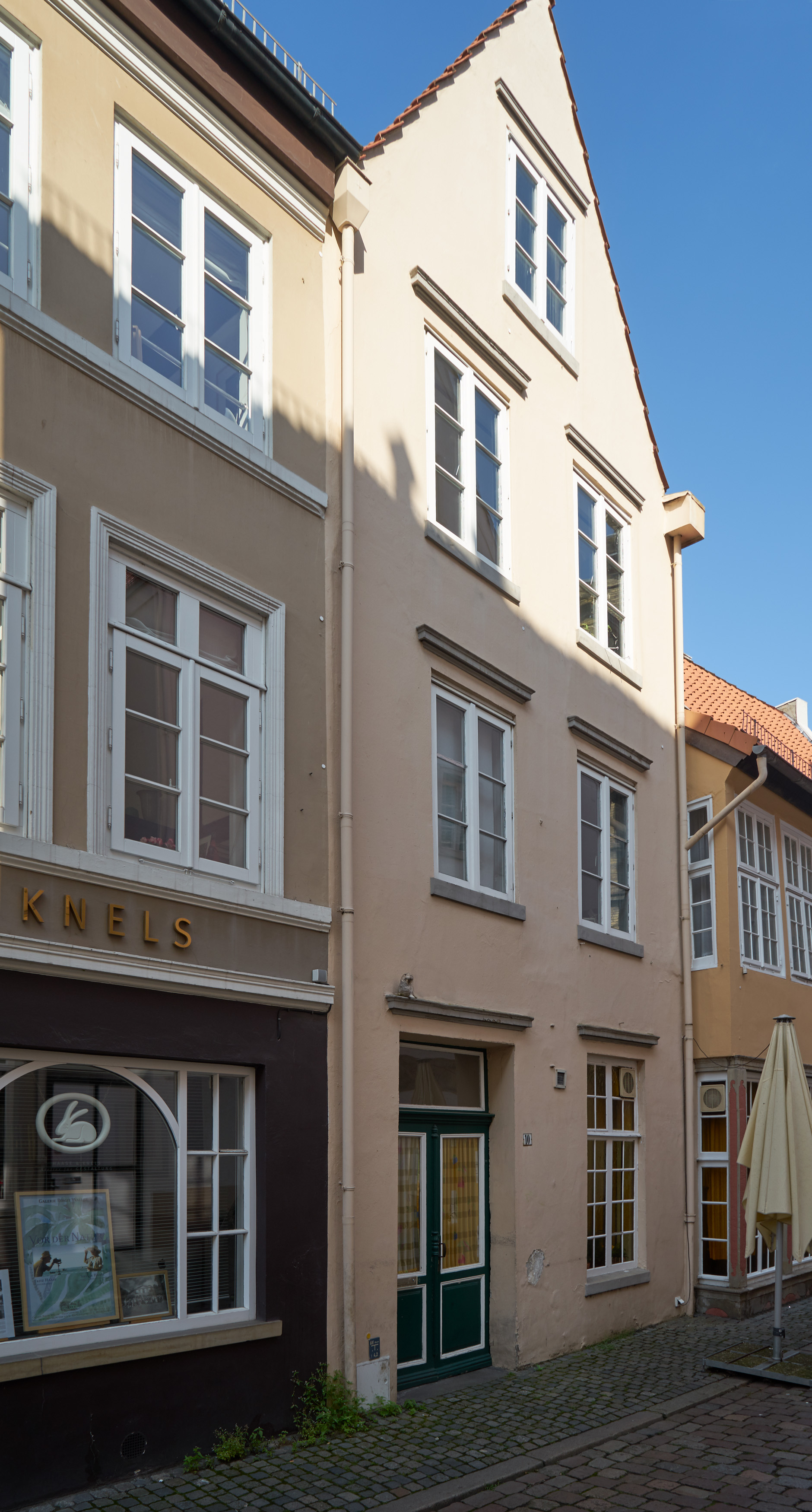 Wohnhaus in Bremen, Am Landherrnamt 10Das abgebildete Objekt ist ein geschütztes Kulturdenkmal in der Freien Hansestadt Bremen, mit der Nr. 1445 beim Landesamt für Denkmalpflege registriert.